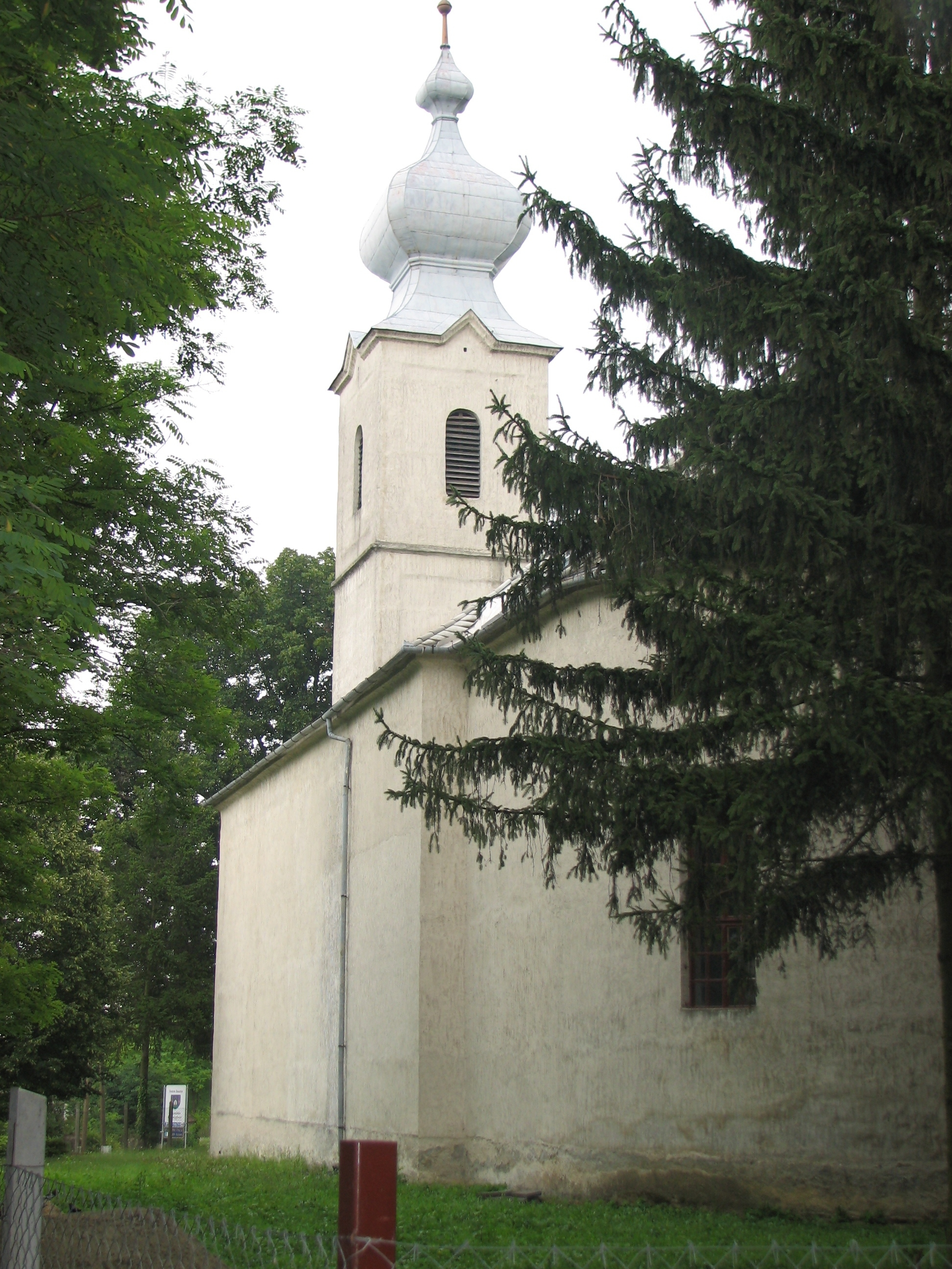 Szent Márton püspök Római katolikus templom (Kisszőlős, Veszprém megye)